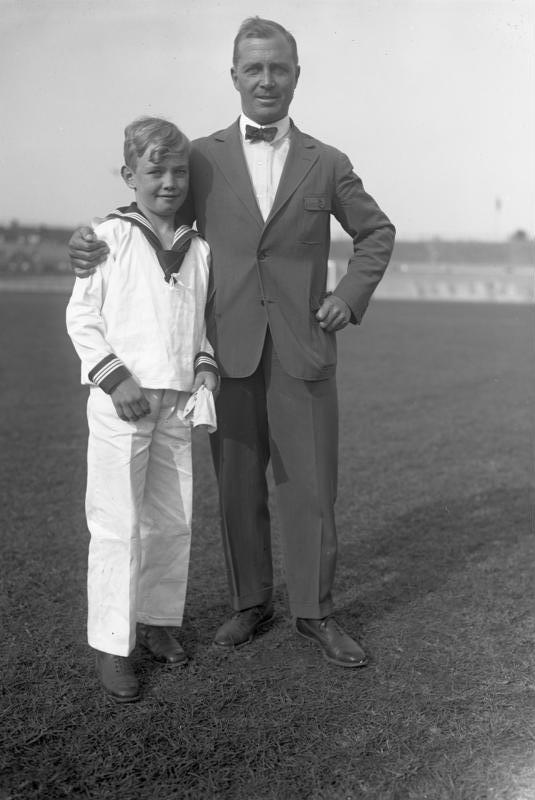 Günther Plüschow, der Flieger von Tsingtau, welcher von einer Reise nach Feuerland zurückgekehrt ist, wurde von dem Reichspräsidenten von Hindenburg empfangen. Neueste Aufnahme des Fliegers von Tsingtau Günther Plüschow.